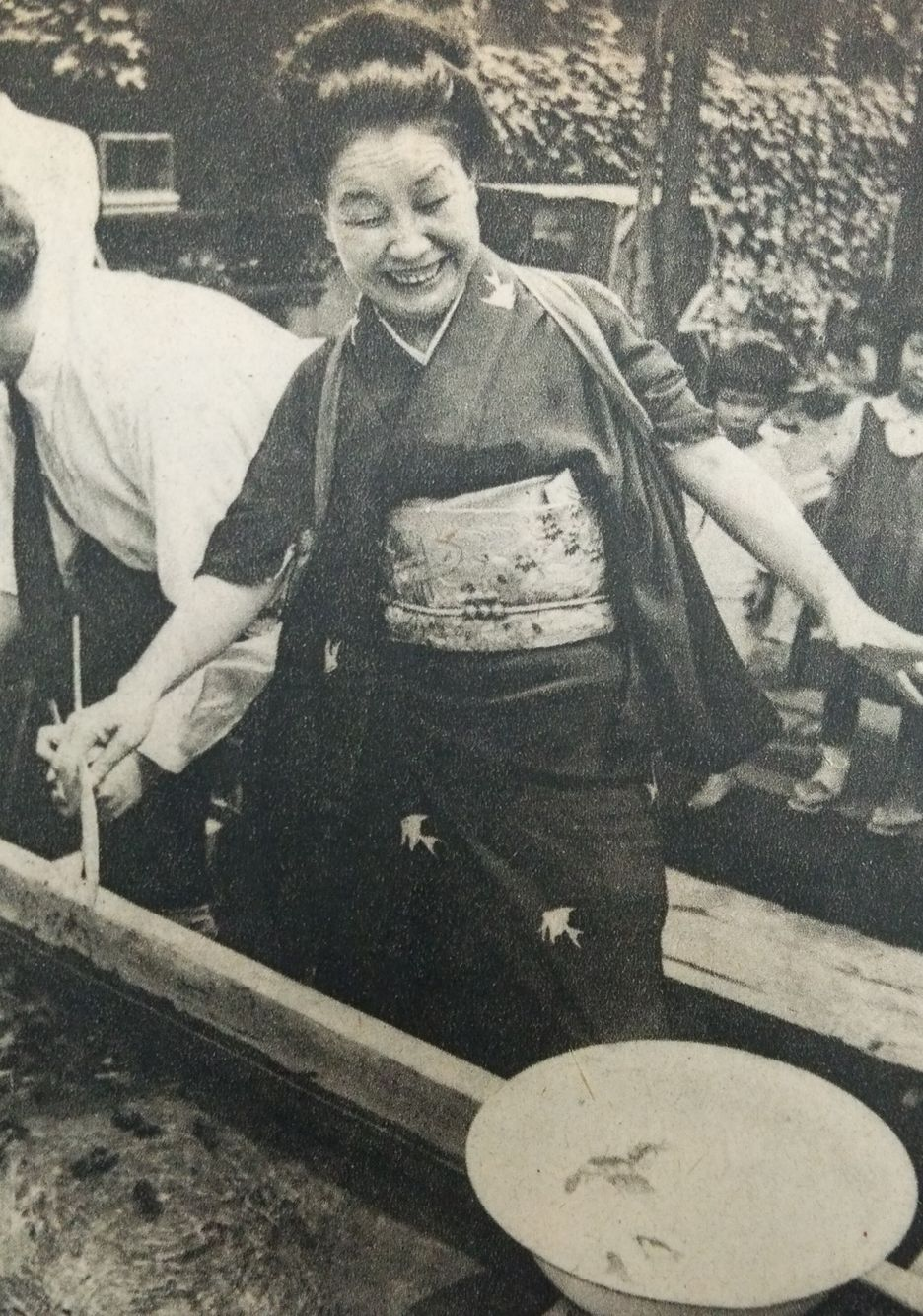 金魚すくい中の飯田 蝶子